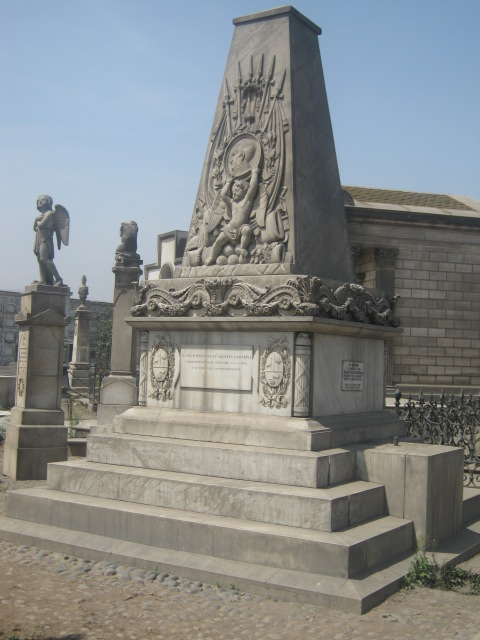 Tumba Agustin Gamarra